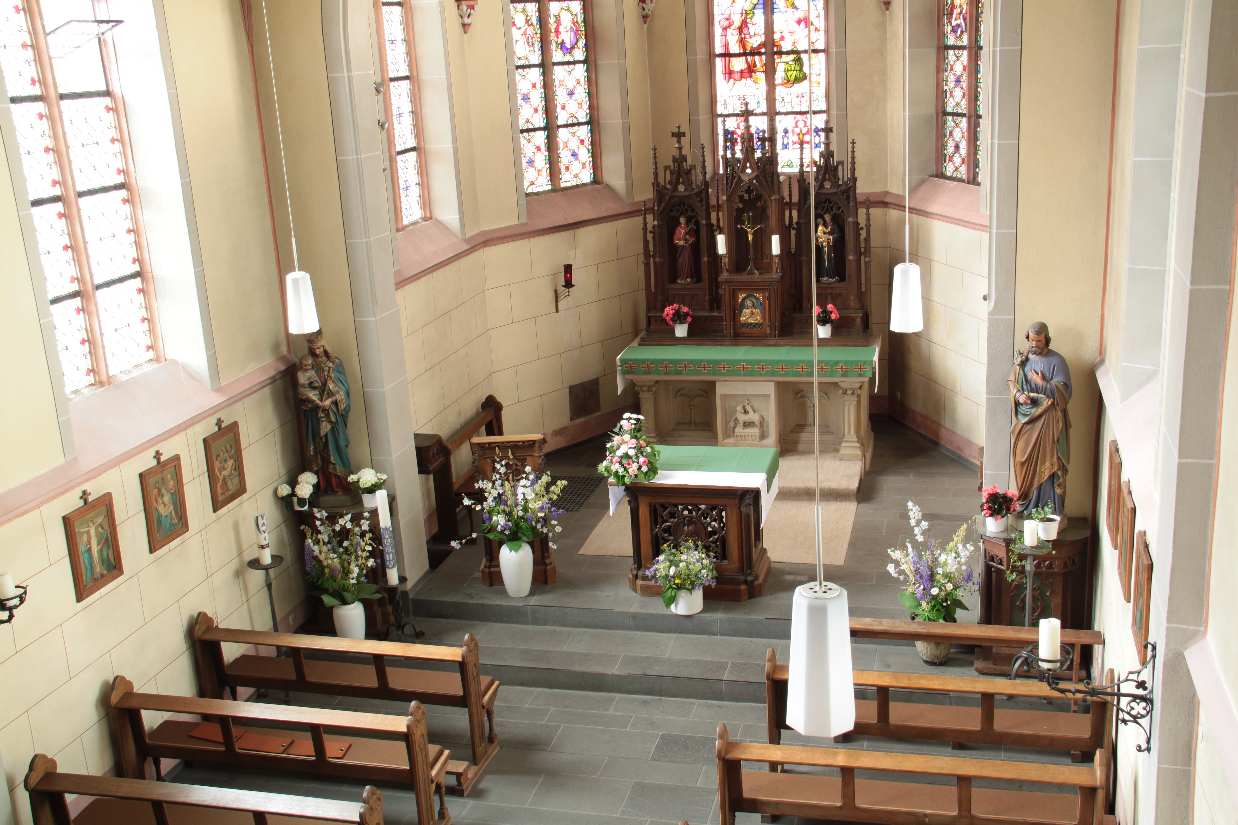 Katholische Kapelle St. Michael, Meckenheim (Merl) This is a photograph of an architectural monument.